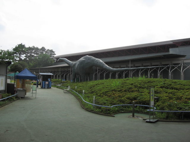 埼玉県所沢市「ユネスコ村自然散策園ゆり園」出口前（建物は現在閉鎖）